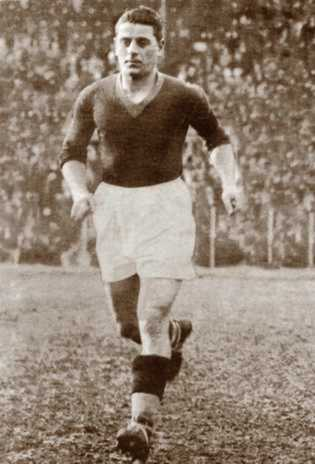 Attilio Ferraris IV in una foto degli anni trenta